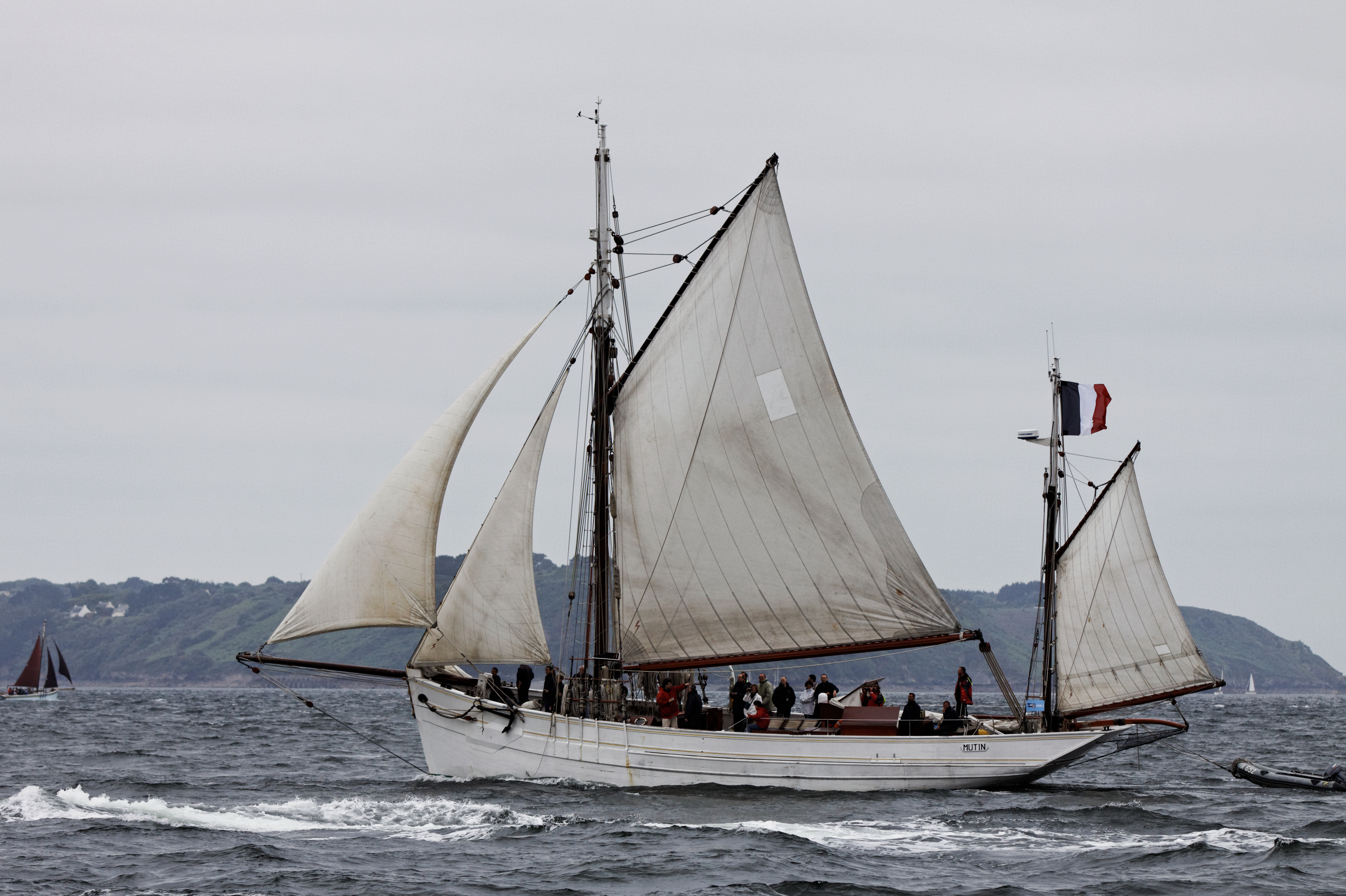 Le Mutin lors des Tonnerres de Brest 2012.